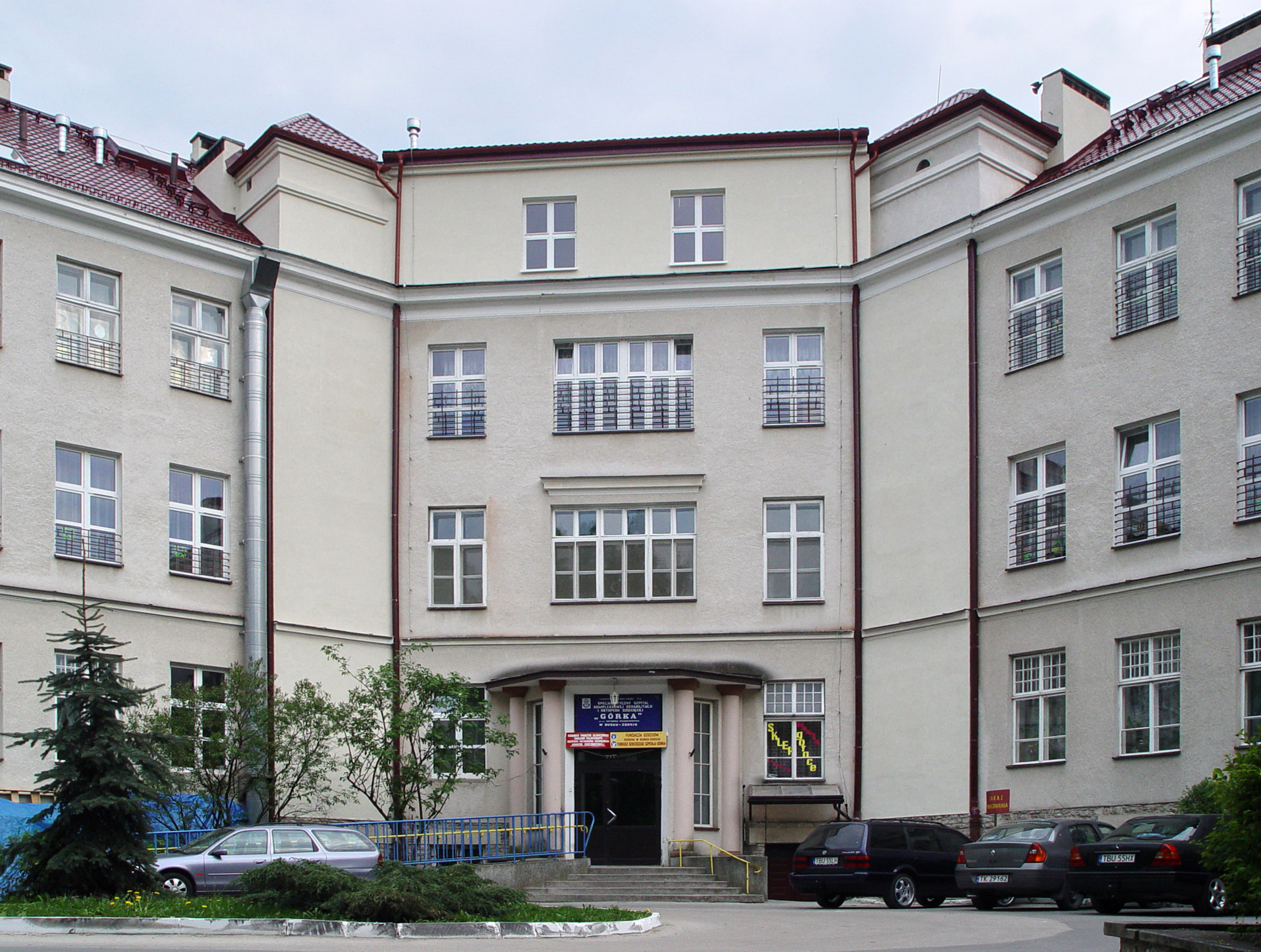 Busko-Zdrój. Sanatorium-szpital Górka, elewacja półn.